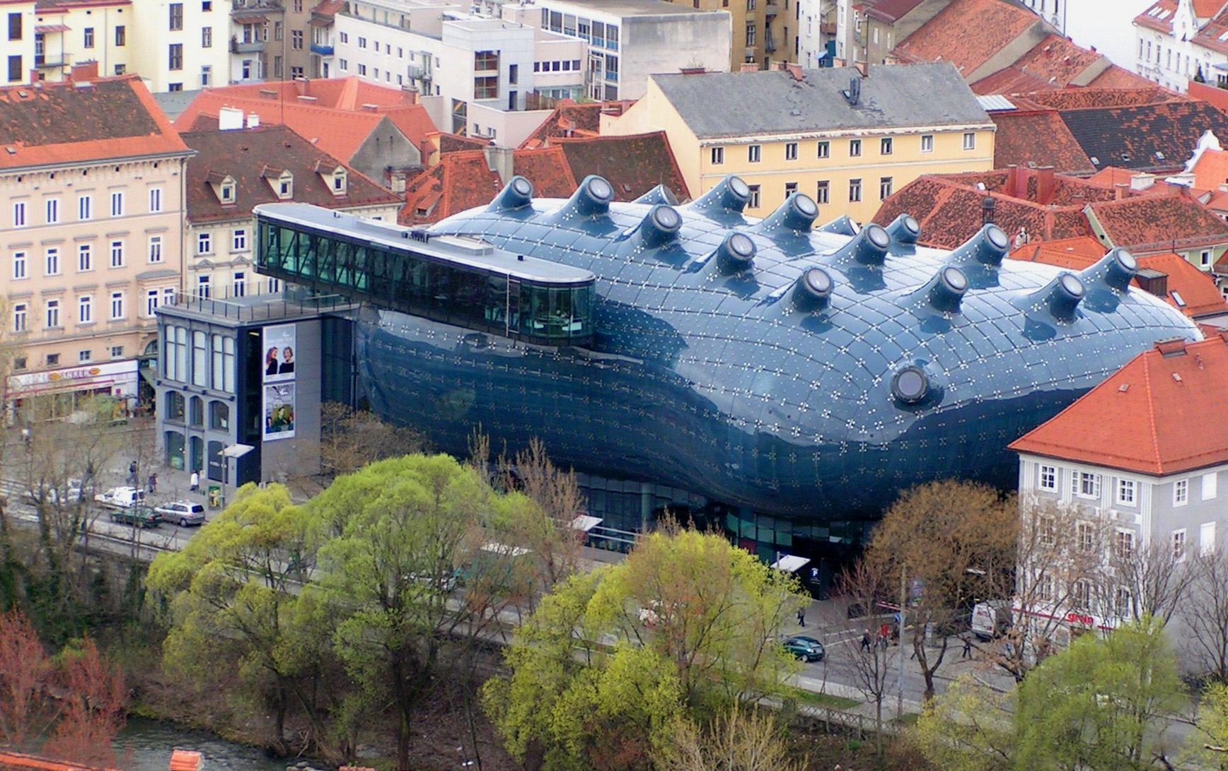 Gratz - La strana cosa